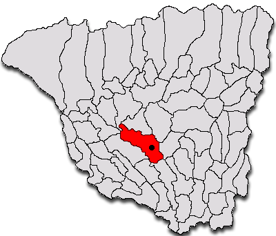 Categorie:Hărţi ale judeţului Gorj